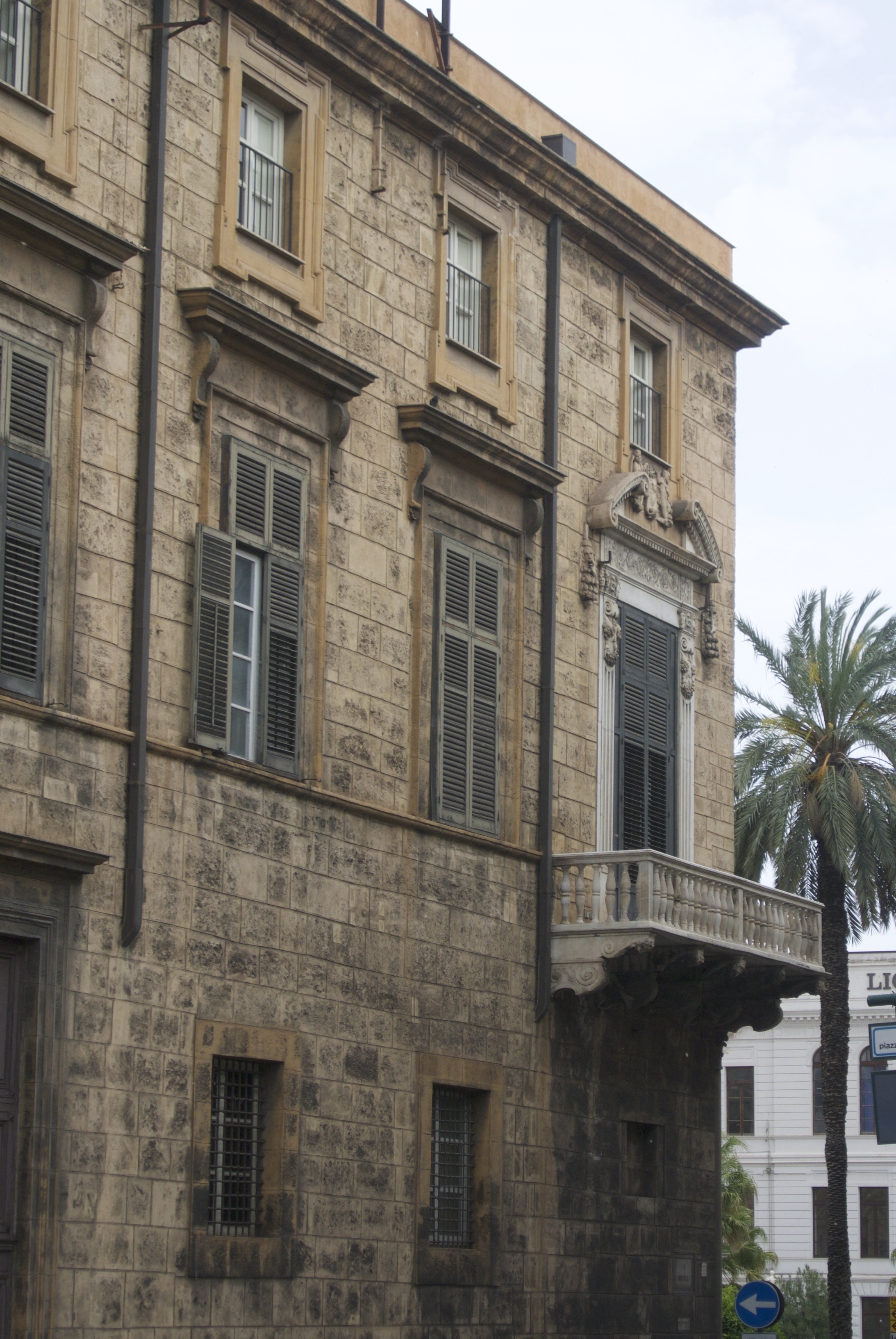 Palerme-Palais de l'Archevêché-Musée diocésien- d'art lythurgique avec les oeuvres de la Cathédrale attenante.